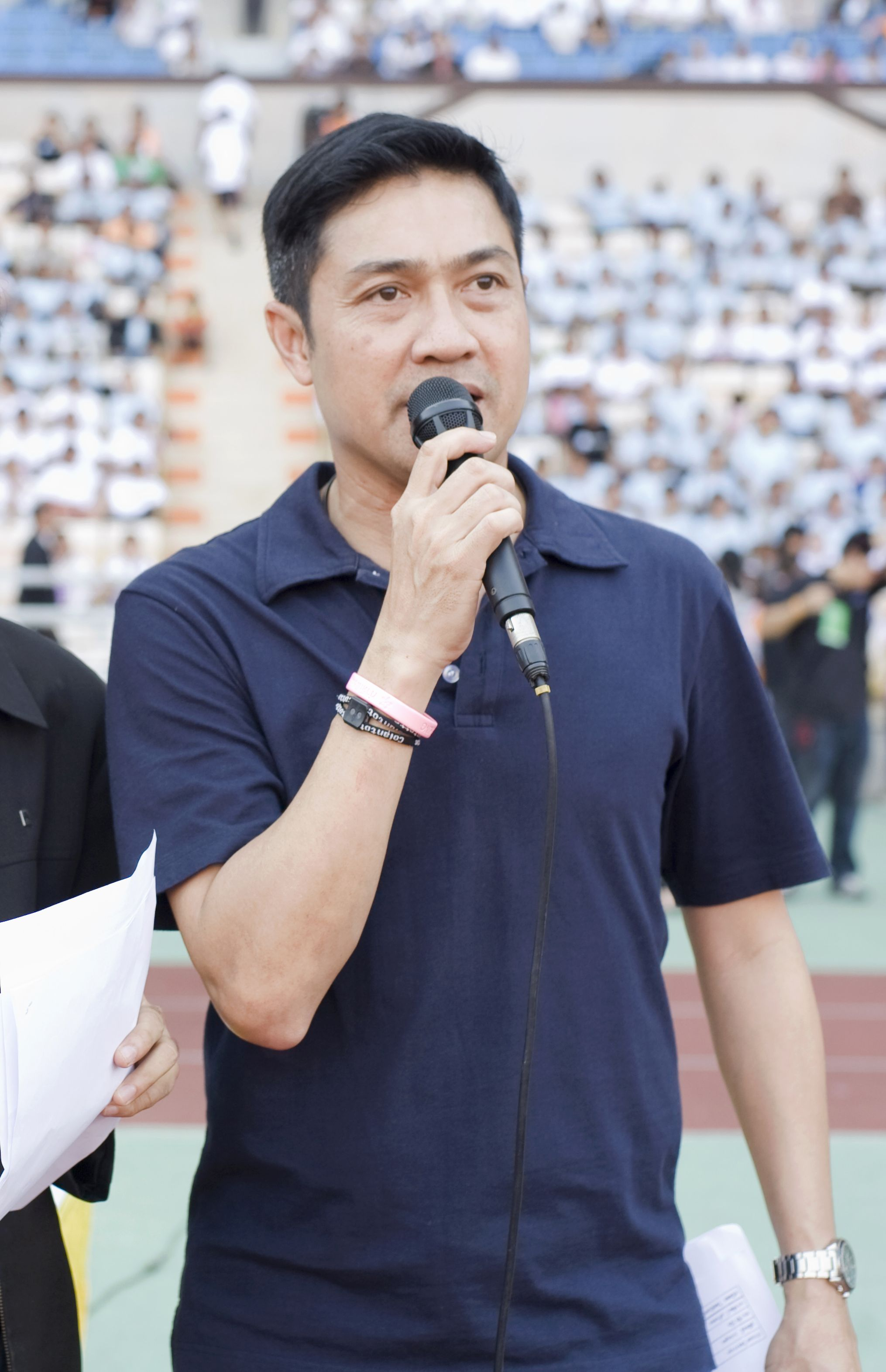 ปิยะพงษ์ ผิวอ่อน / นายกรัฐมนตรี นำทีมนักกีฬาฟุตบอลชายกิตติมศักดิ์เข้าร่วมการแข่งขันฟุตบอลนัดพิเศษกับทีม ฟุตบอลหญิงทีมชาติไทยชุดใหญ่ ณ สนามราชมังคลากีฬาสถาน กรุงเทพฯ 21 กุมภาพันธ์ 2553 (The Official Site of The Prime Minister of Thailand Photo by พีรพัฒน์ วิมลรังครัตน์)